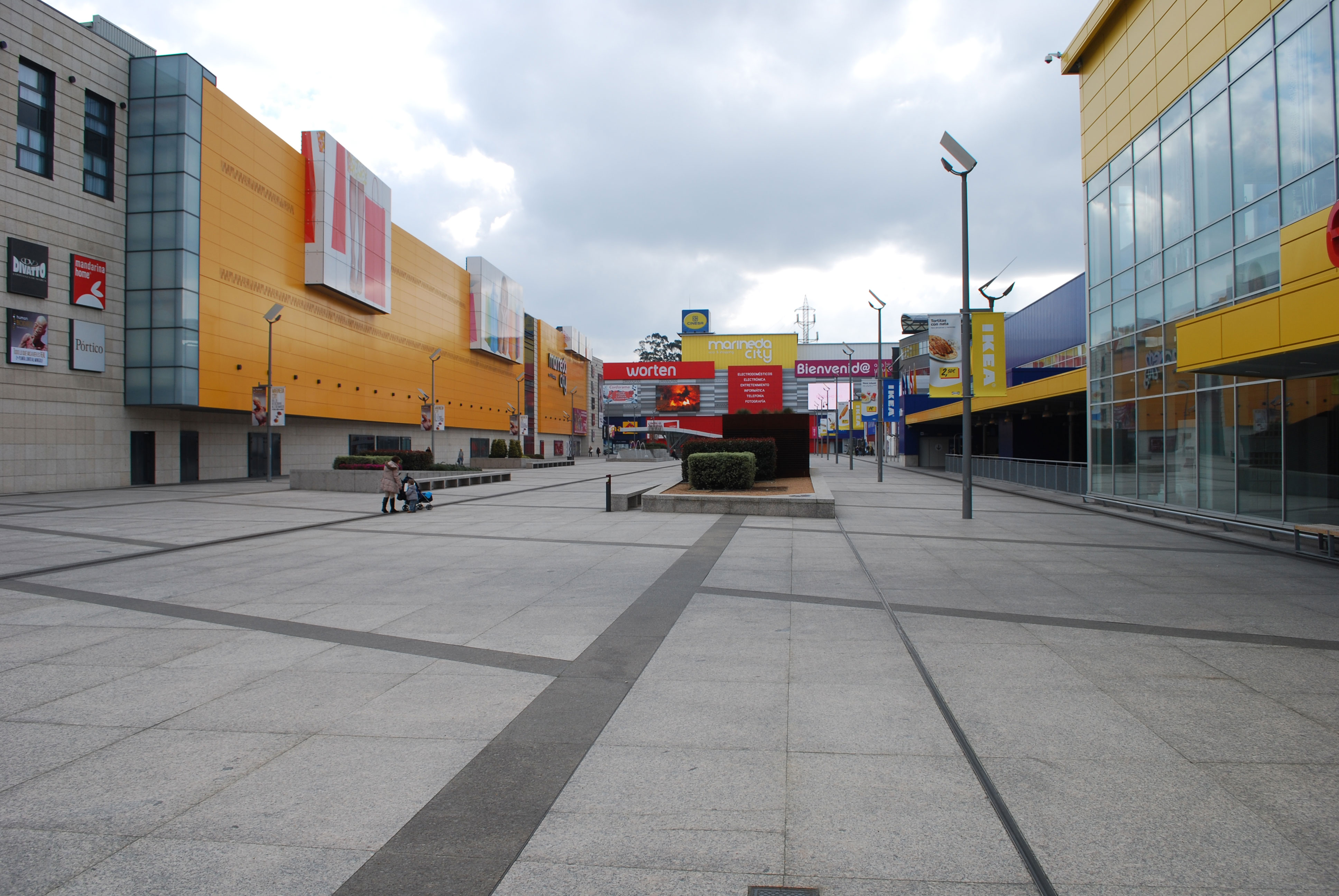 Praza Central CC Marineda City A Coruña Galiza Spain